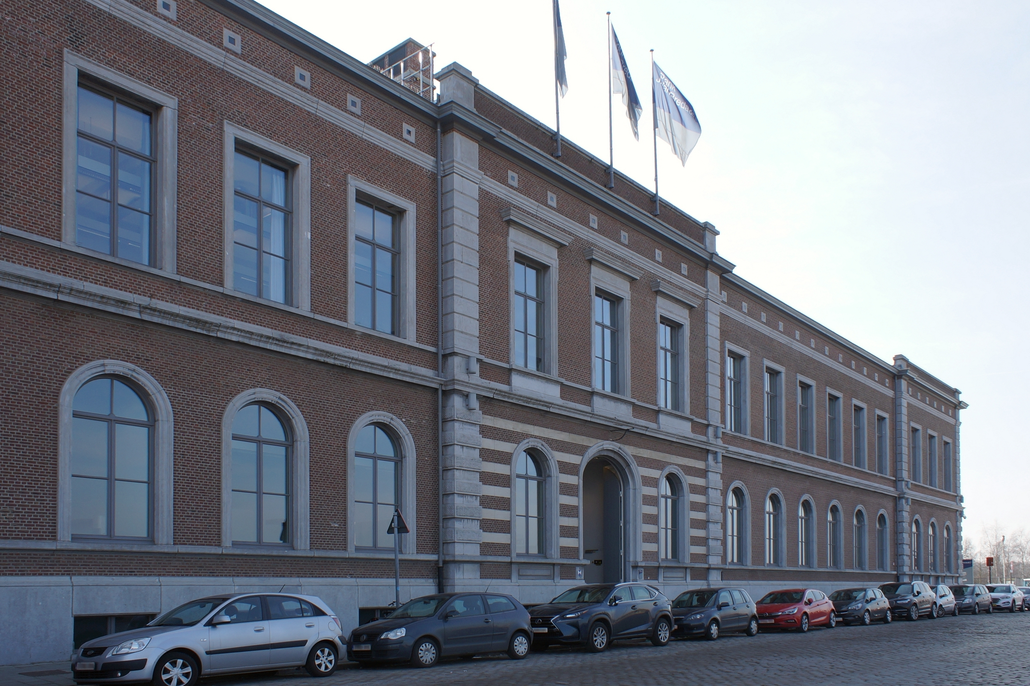 Antwerpen, Ledeganckkaai 7. Voormalig goederenstation Antwerpen-Zuid, als station gesloten sinds 1988. Sedert 2004 is dit gebouw de hoofdzetel van de Bank J. Van Breda & C°.